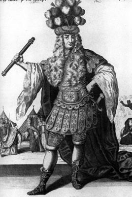 dramatischer Held im Stegreiftheater des 17. und 18. Jhd. mit besonders spaktakulärem Kostüm